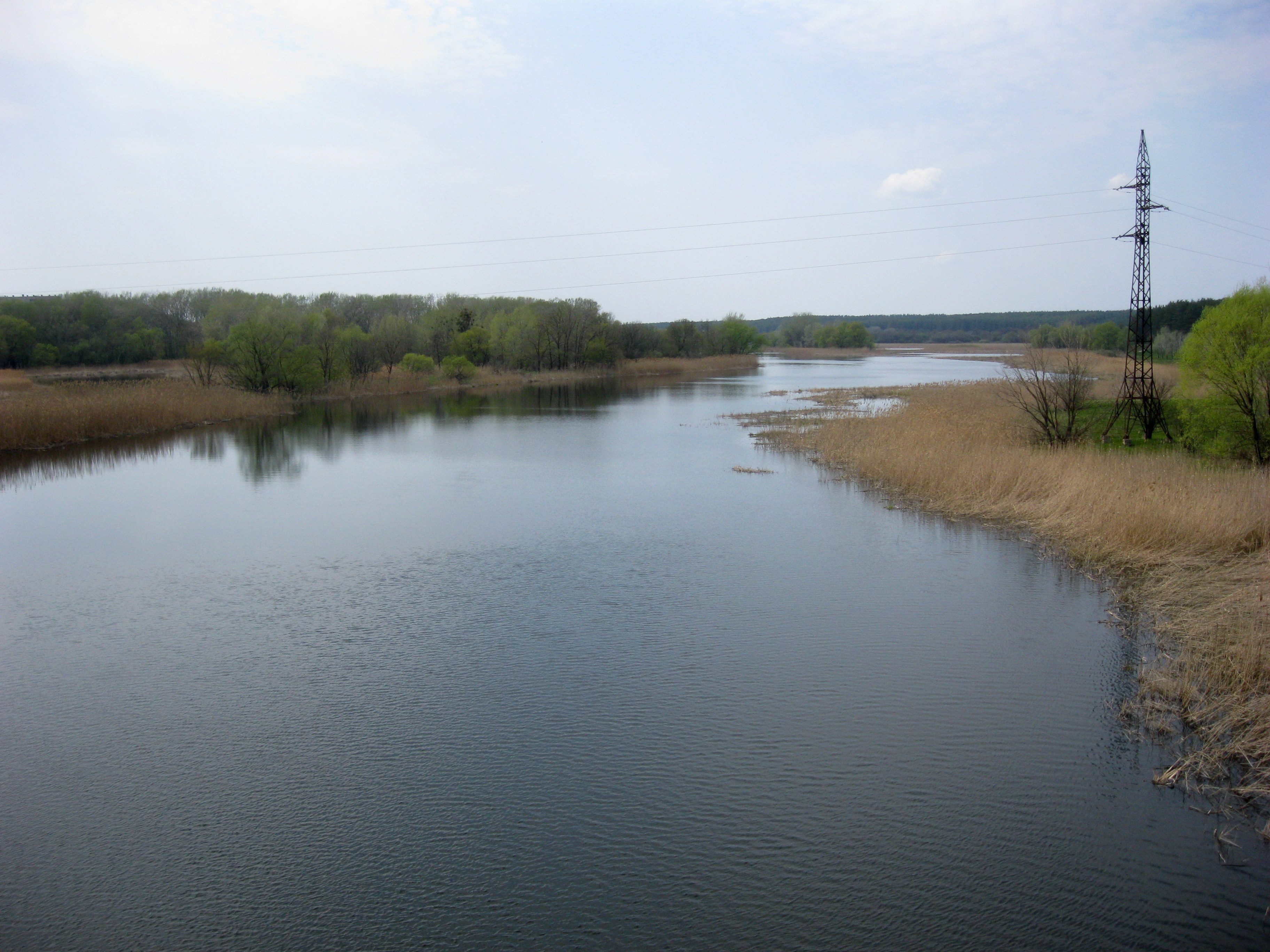 Ріка Сіверський Дінець[вид справа]